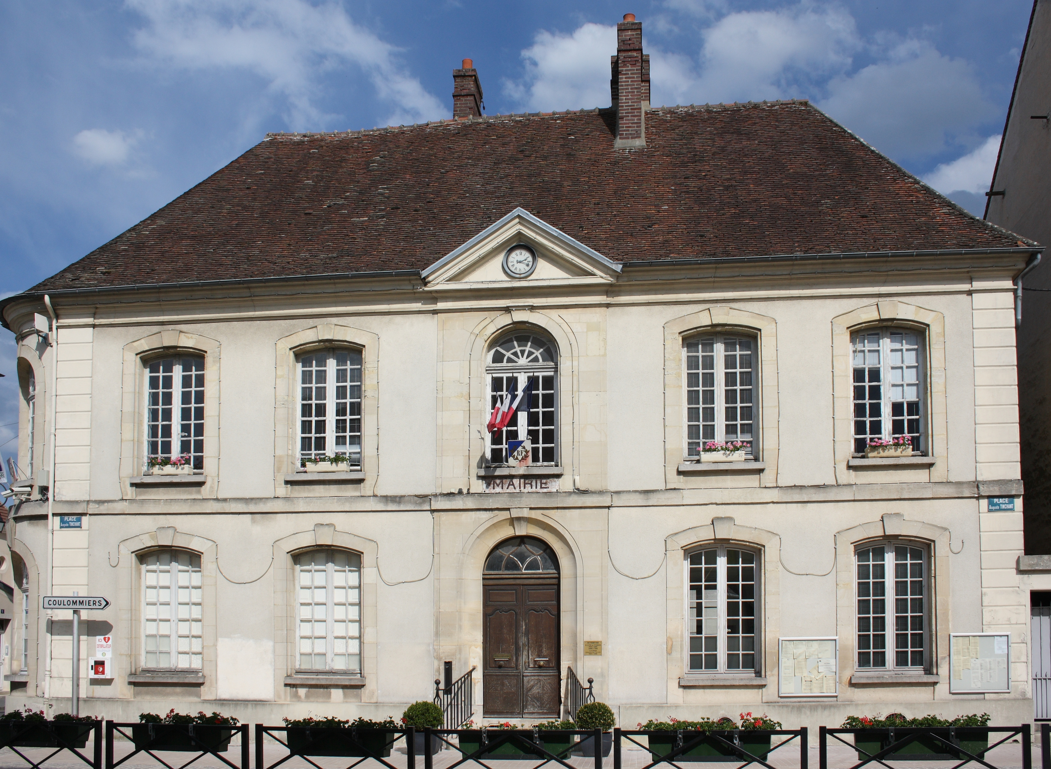 Rathaus von Jouarre, einer Gemeinde im Département Seine-et-Marne (Île-de-France)